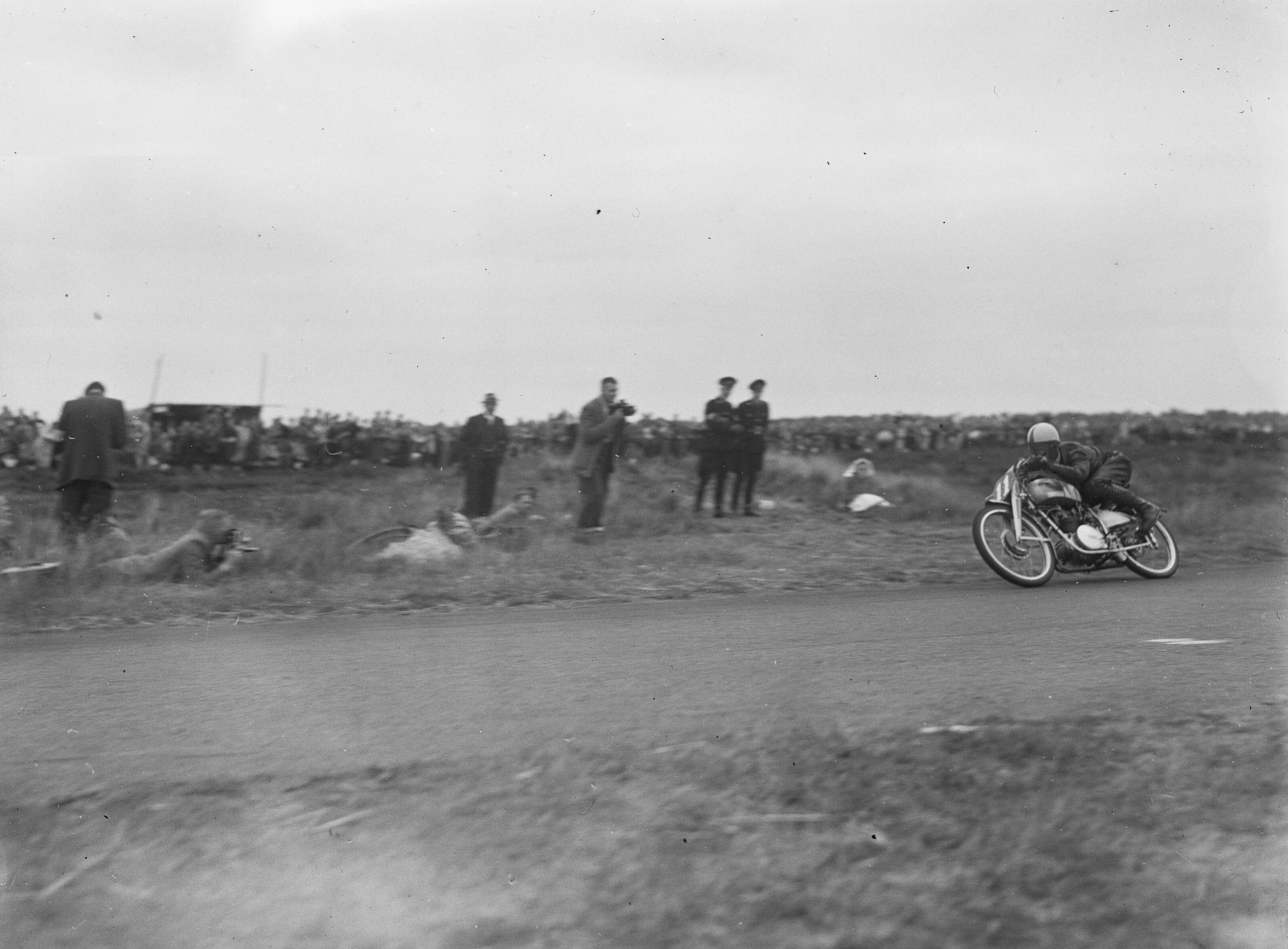 Collectie / Archief : Fotocollectie Anefo Reportage / Serie : TT Assen 1949 Beschrijving : Nello Pagani (winnaar 125cc) in de bocht Datum : 9 juli 1949 Locatie : Assen Trefwoorden : motorsport Persoonsnaam : Pagani, Nello Instellingsnaam : TT Fotograaf : Winterbergen, […] / Anefo Auteursrechthebbende : Nationaal Archief Materiaalsoort : Glasnegatief Nummer archiefinventaris : bekijk toegang 2.24.01.09 Bestanddeelnummer : 903-4796